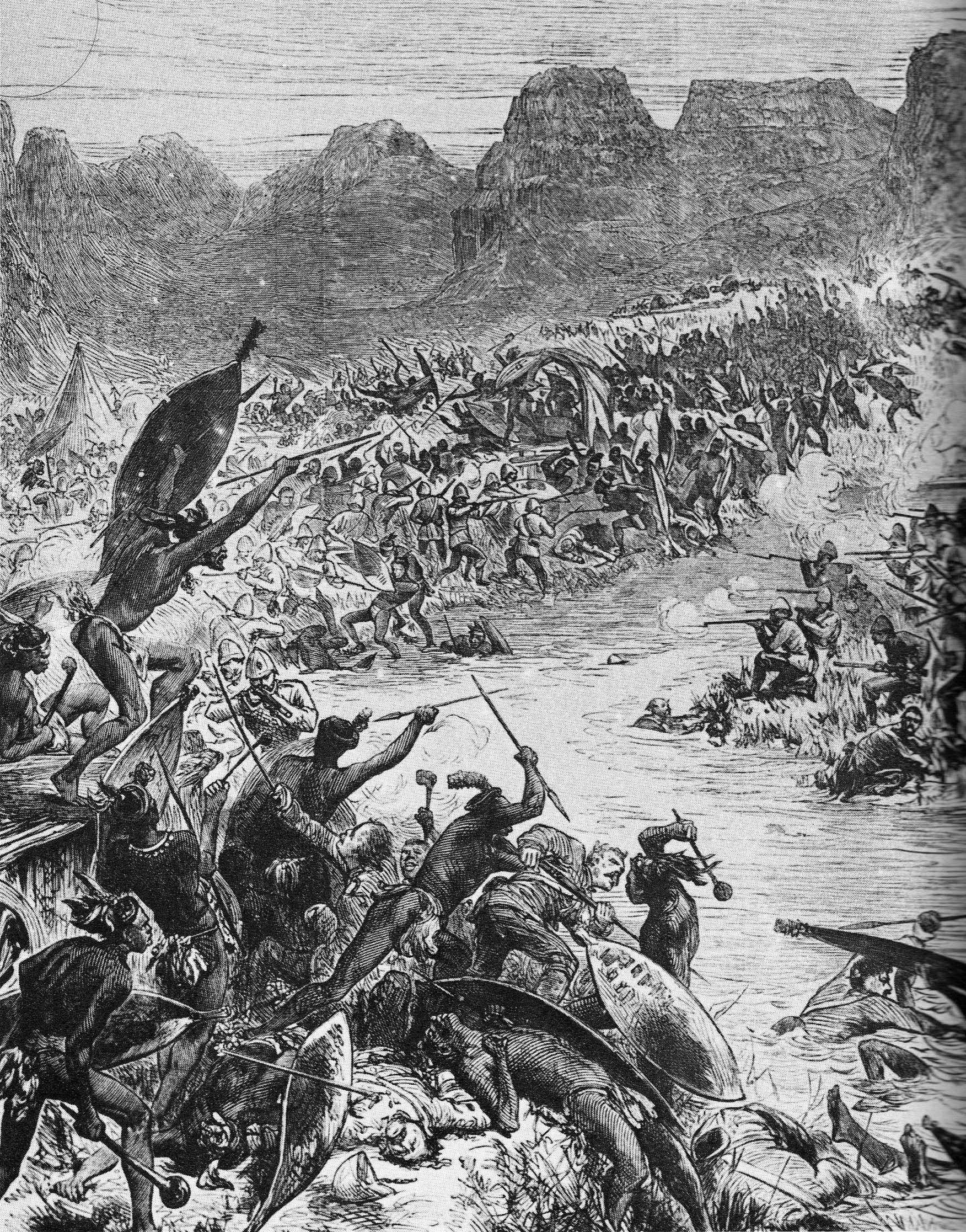 Bataille de la Ntombe, 12 mars 1879. Gravure parue dans l'Illustrated London News